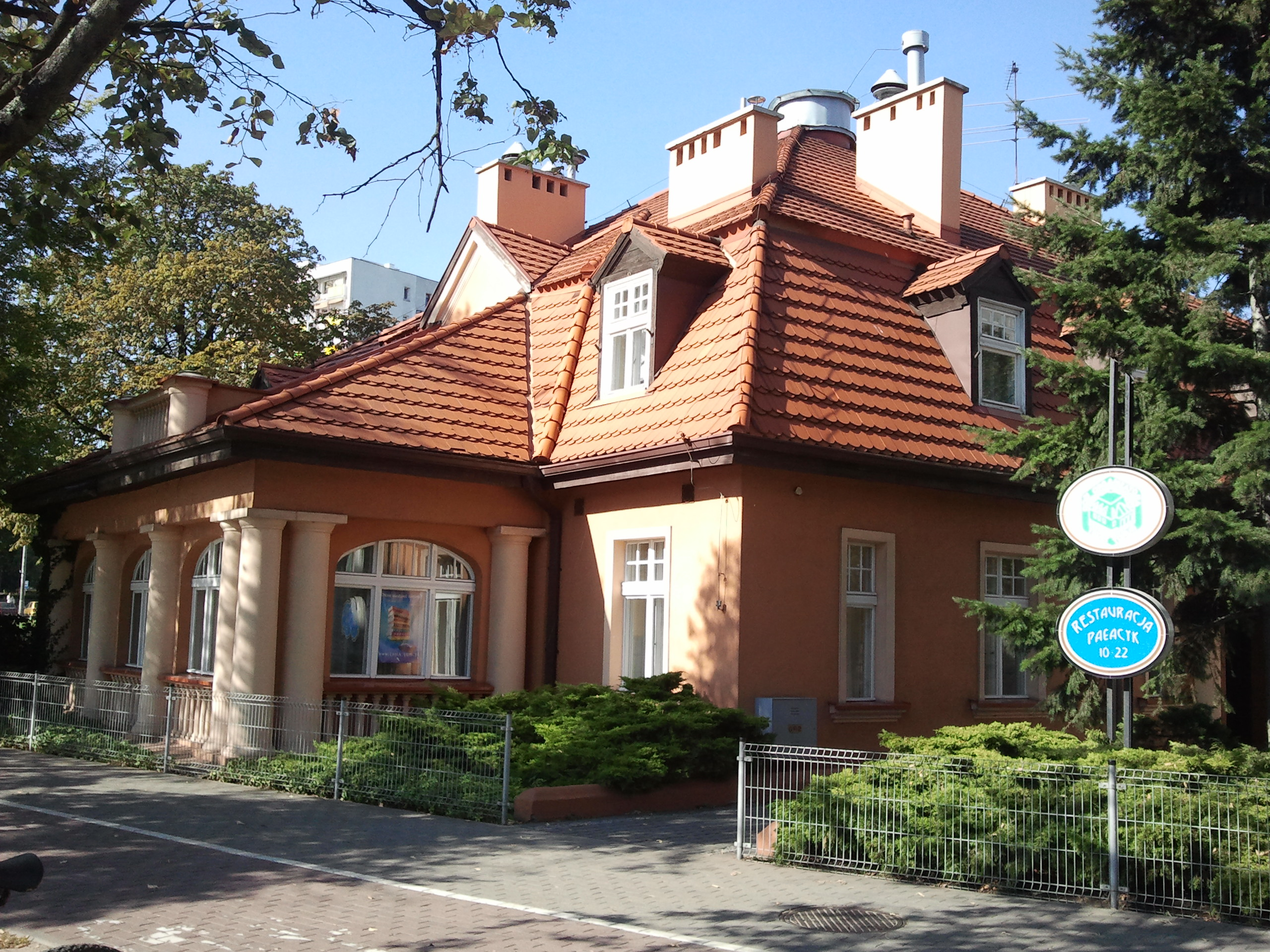 Toruń, ul. Czerwona Droga 8 - willa, 1923-1925 (zabytek nr A/574)